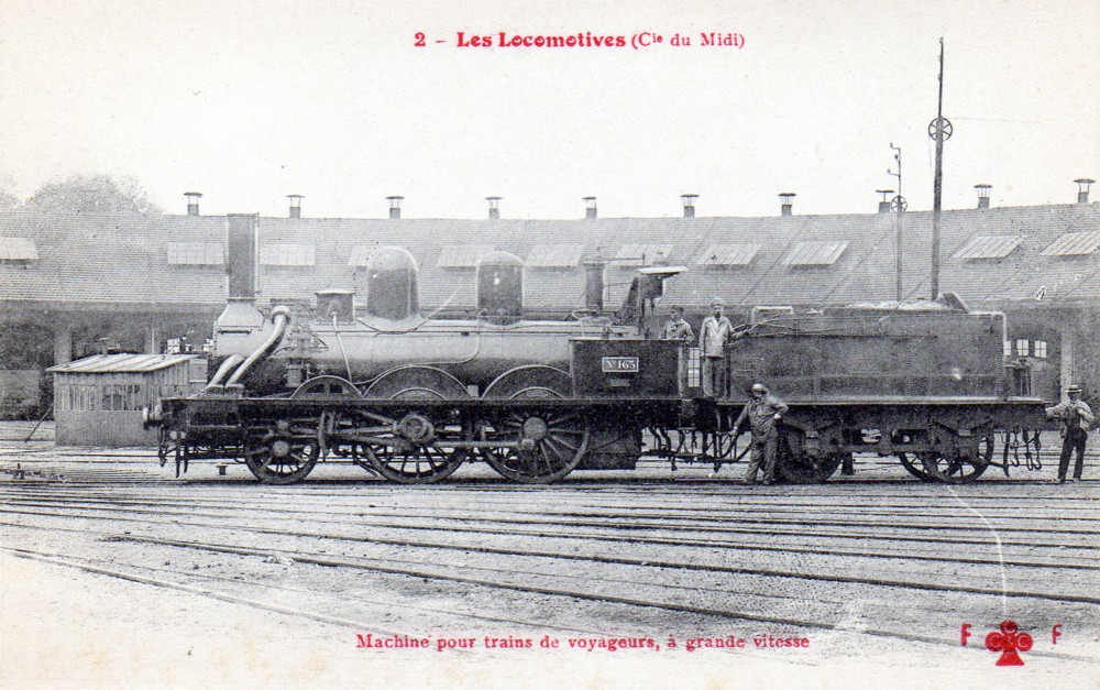 Locomotive Midi 163 à Bordeaux ; carte postale F. Fleury de 1895.